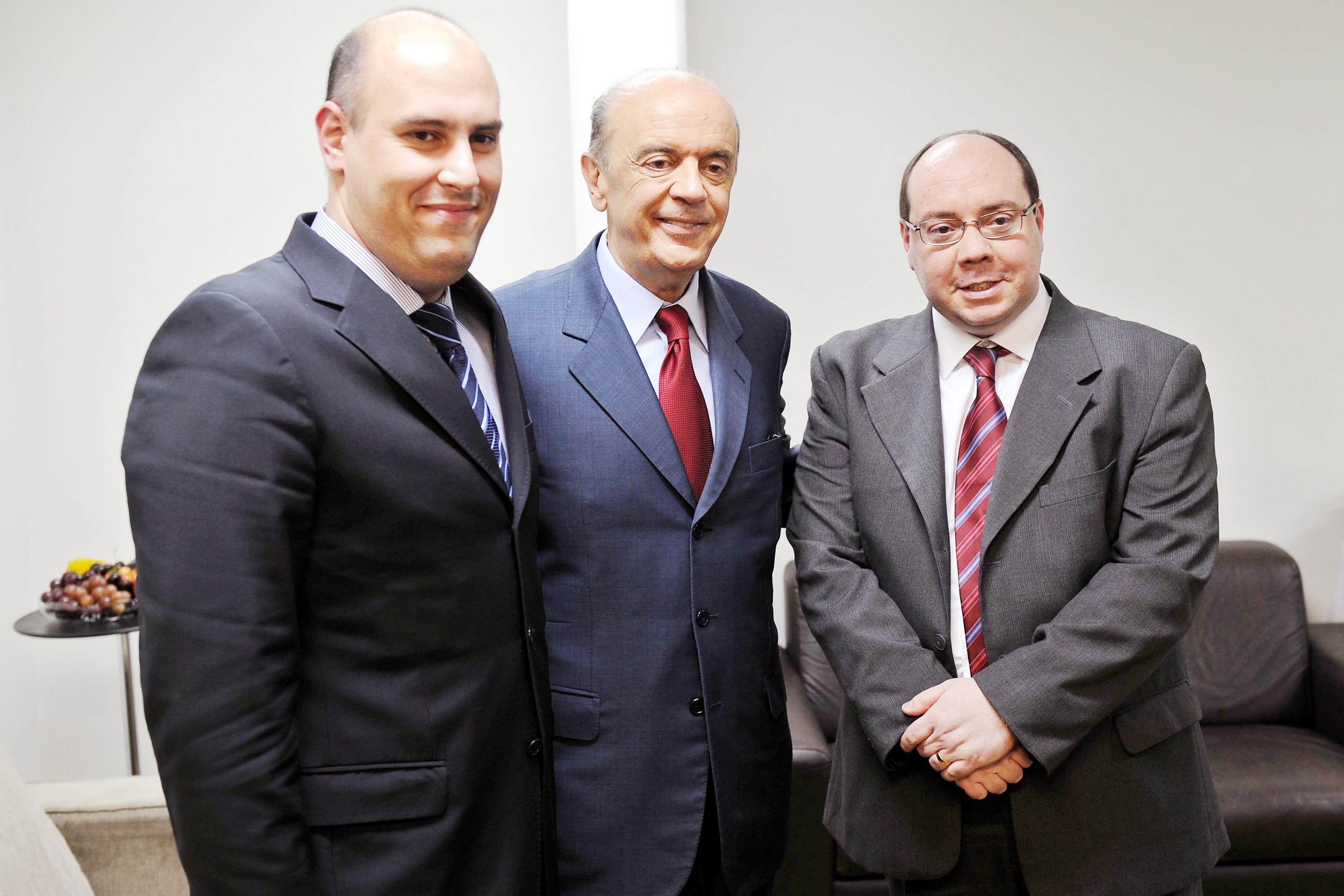 José Serra chega aos estúdios da TV Record para participar da Sabatina promovida pelo Portal R7, em parceria com a Record News. Ao seu lado, Douglas Tavolaro, Alexandre Raposo e Zacarias Pagnanelli. São Paulo, SP, 29/07/2010 Foto Cacalos Garrastazu/ObritoNews